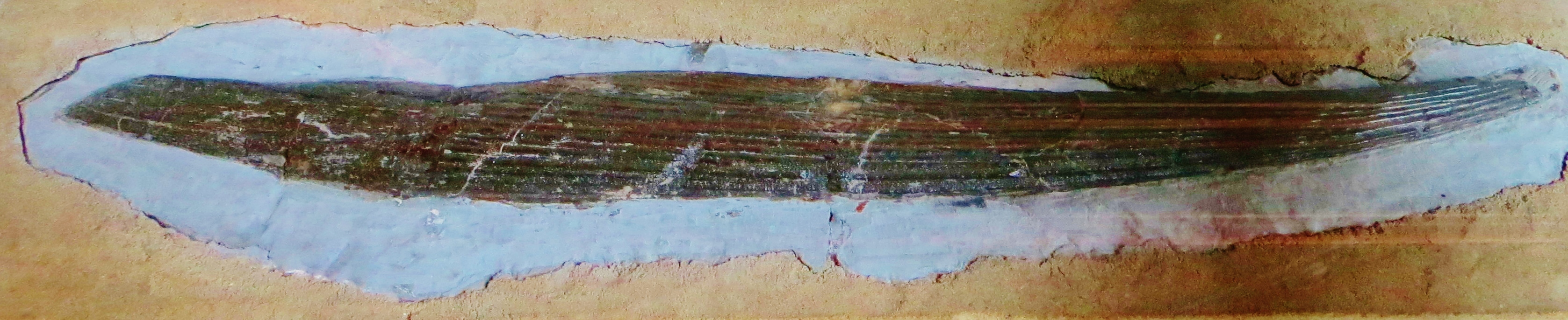 Fossil of Acrodus, an extinct fish - Took the picture at Teylers Museum, Haarlem